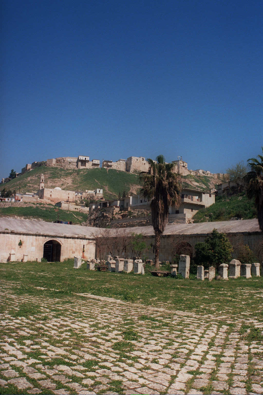 Apamea - Siria Caravanserraglio - ora sede del Museo del Mosaico